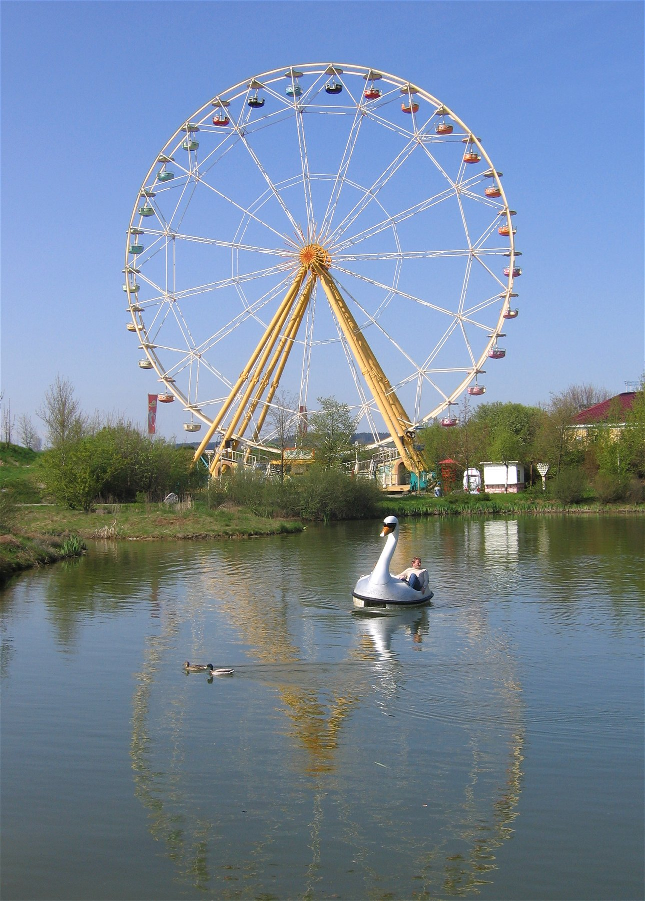 Allgäu-Skyline-Park, Riesenrad